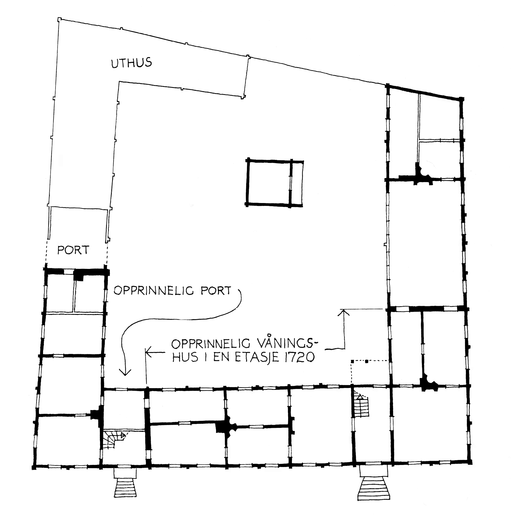 Plan of Hornemansgården in Trondheim around 1800.